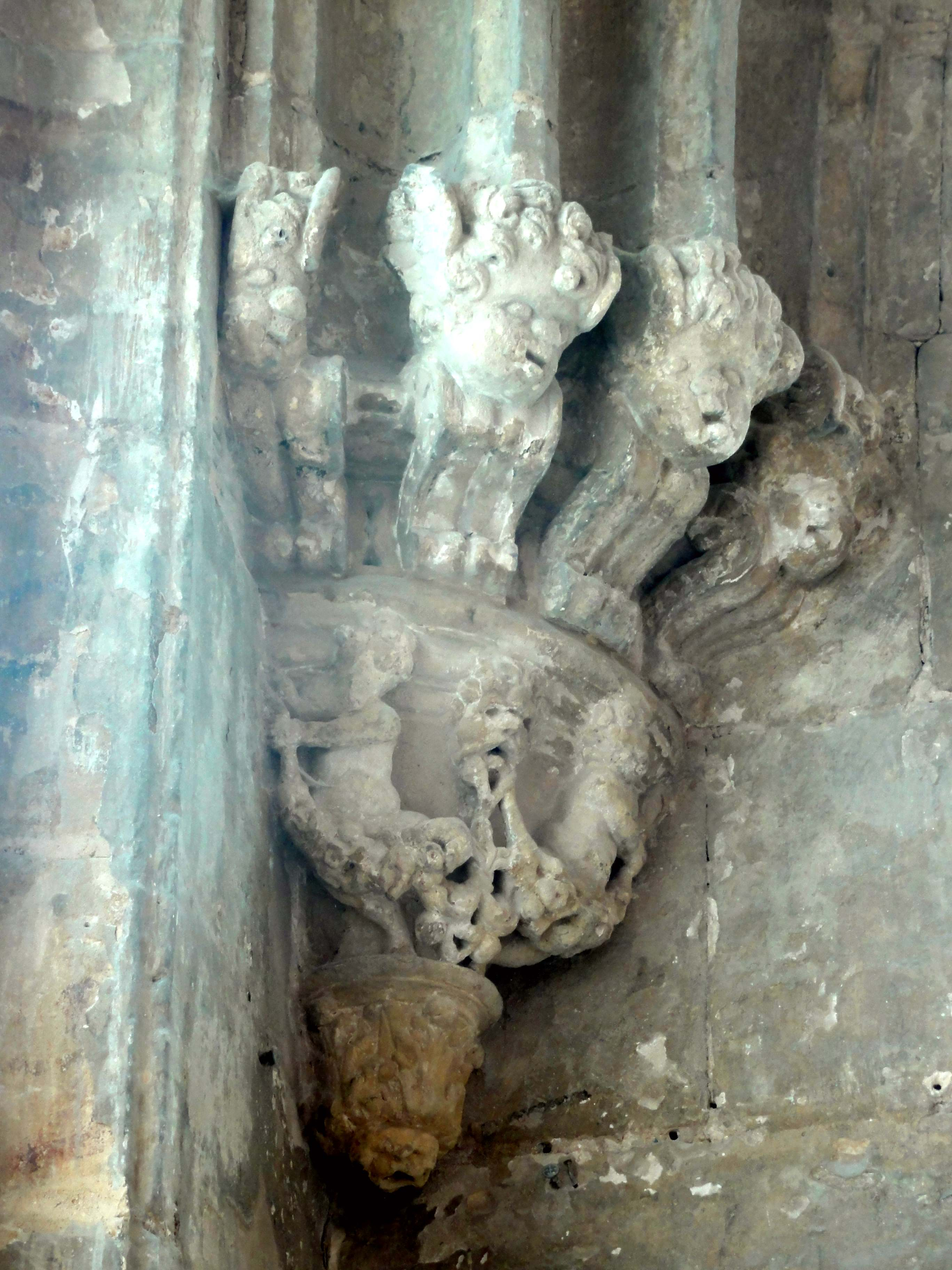 Cul-de-lampe - voir titre.